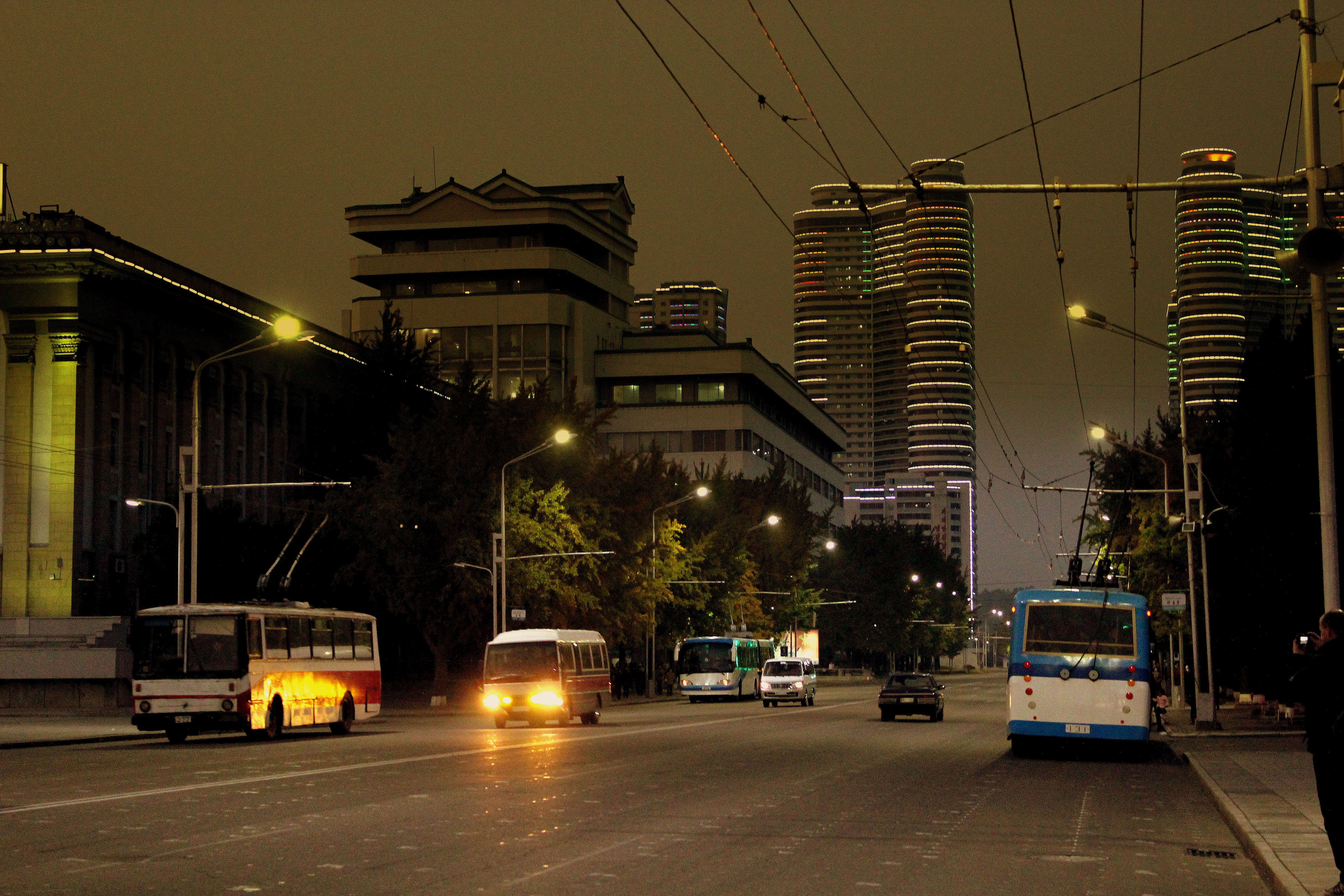 PYONGYANG CITY AT NIGHT DPR KOREA OCT 2012